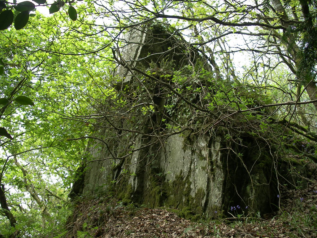 Pierres druidique à Périgny (Calvados)